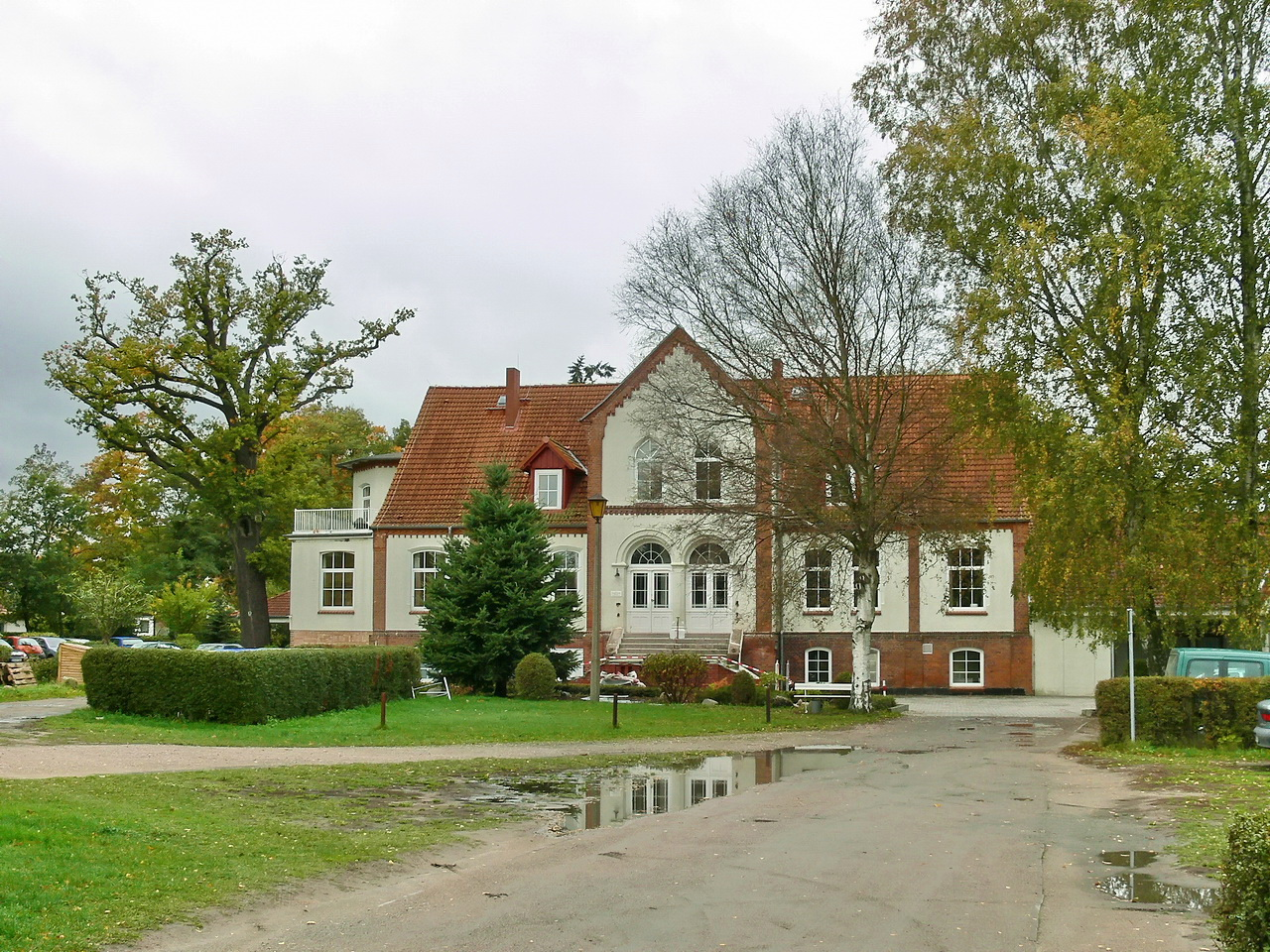 Ehemalige Forstinspektion in Gelbensande. Heute ein Pflegeheim. - The ancient forester's house in Gelbensande. Today a nursing home.